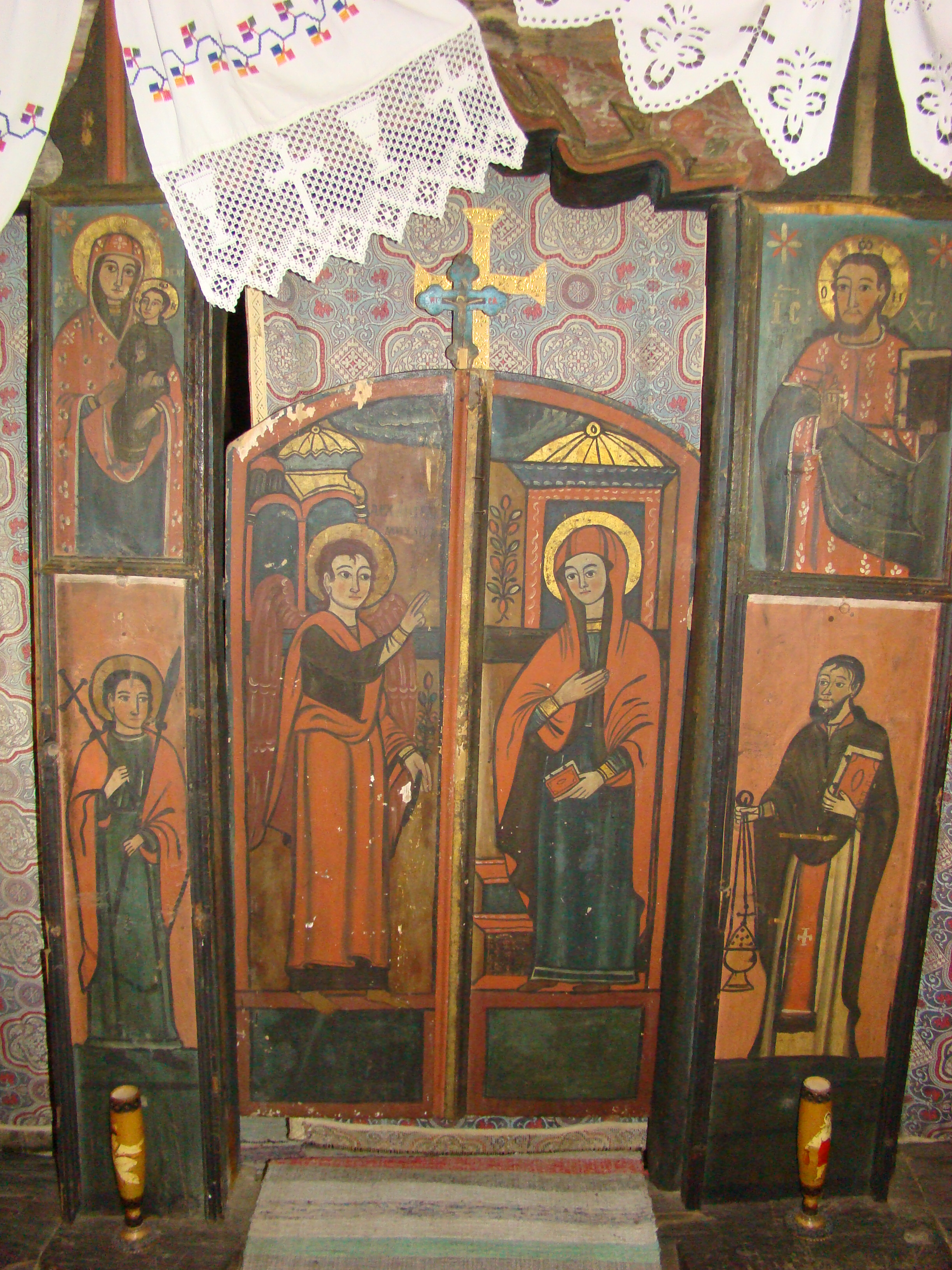 Biserica de lemn din Tinca, județul Bihor